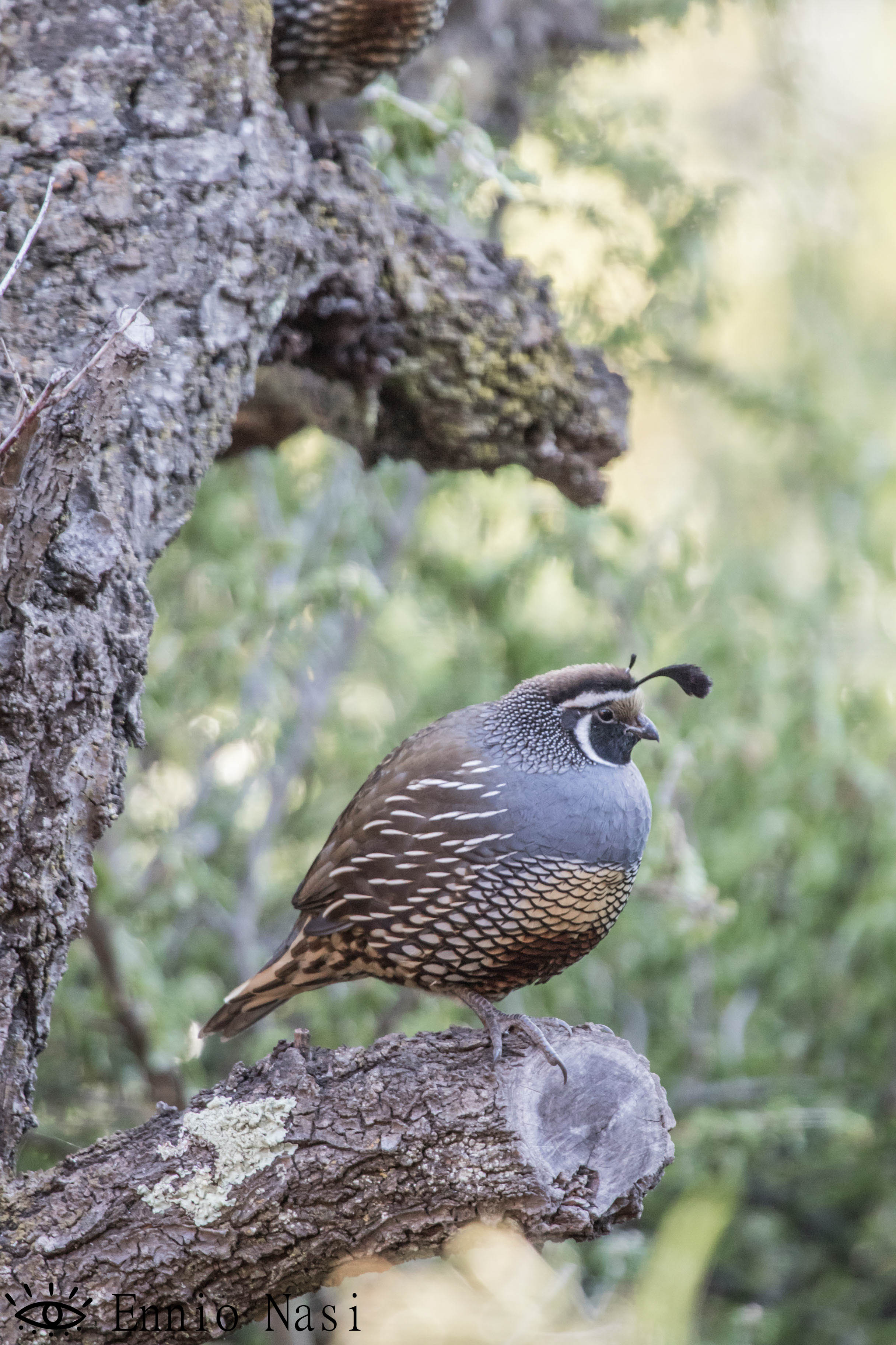 Codorniz Californiana fotografiada en El Arrayán, sector ubicado en la Región metropolitana, Chile.